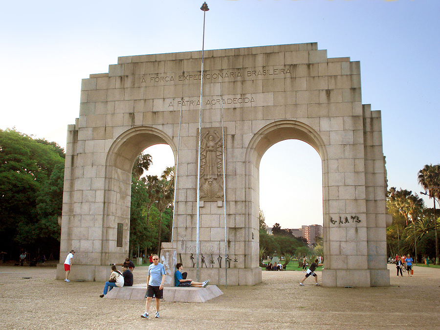 Monumento ao Expedicionário, Porto Alegre, Brasil.